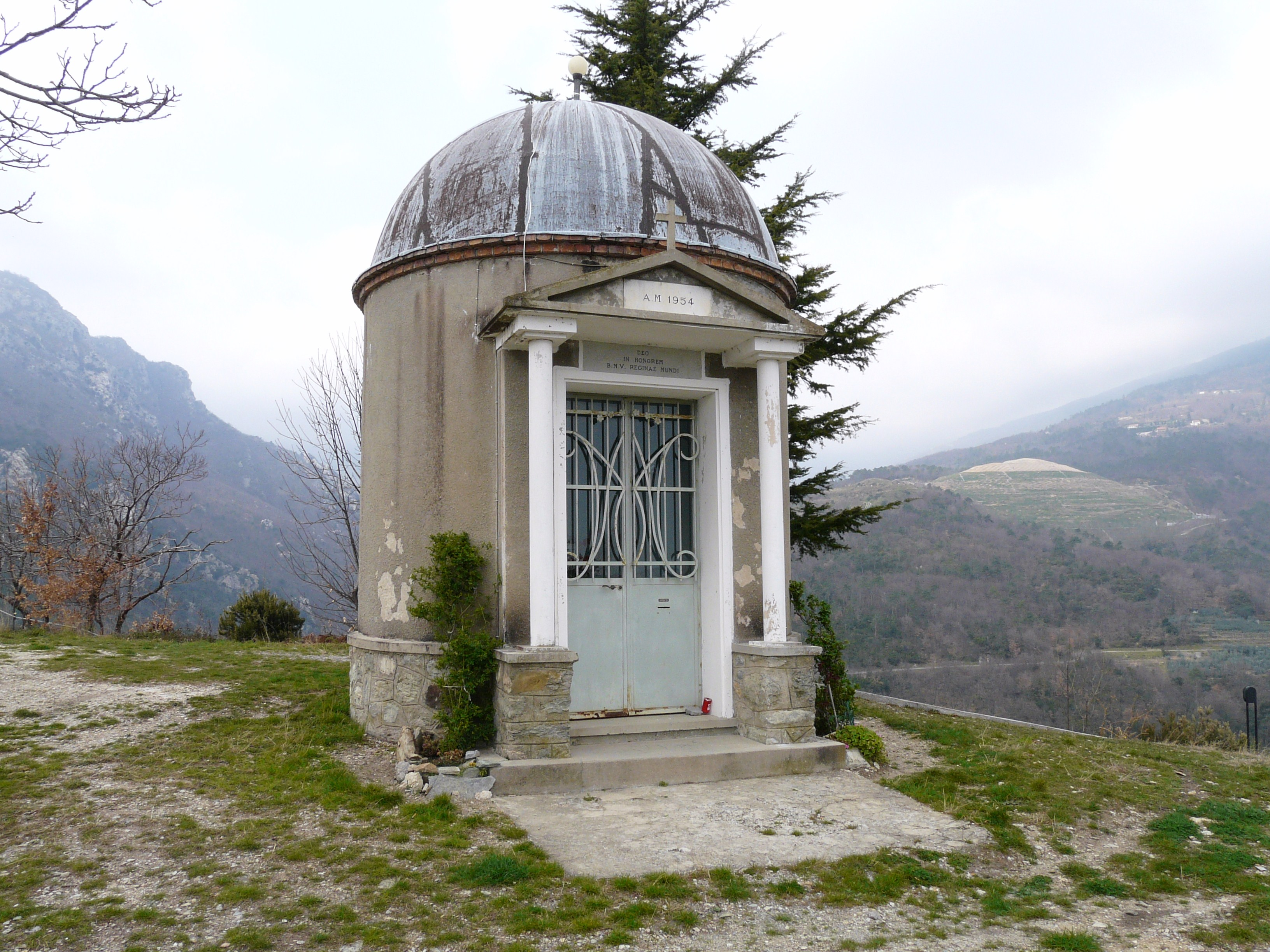 Santuario dei Santi Cosma e Damiano, Magliolo, Liguria, Italia